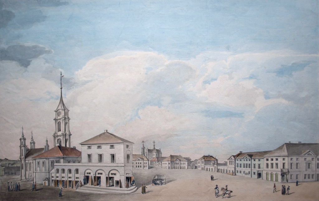 Беларуская (тарашкевіца): Віцебск (Viciebsk), завулак Біржавы (zavułak Biržavy) з боку вуліцы Вялікай (vulica Vialikaja). Ратуша